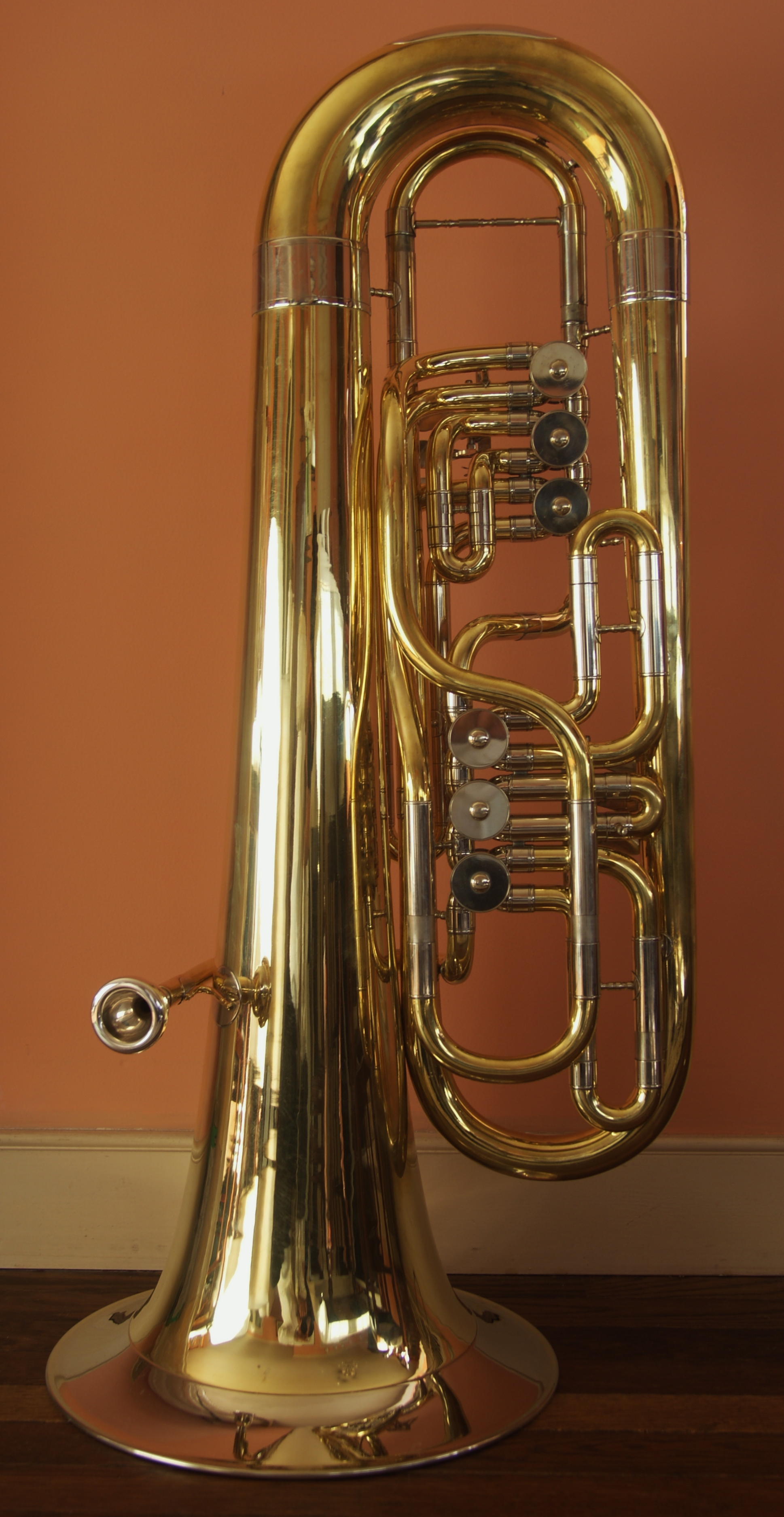 バルブはマウスパイプ側から①②③④⑤⑥、左手で①②③、右手で④⑤⑥をバルブ操作する。 ①は、F調を全音（長2度）下げる ②は、F調を半音（短2度）下げる ③は、F調を全音（長2度よりやや狭い）下げる（「G調（①＋②＋④＋⑤＋⑥を押さえた状態）を半音下げる」ともいえる） ④は、C調を全音（長2度）下げる ⑤は、C調を半音（短2度）下げる ⑥は、F調を2全音半（完全4度）下げる（FチューバをCチューバに変える）。